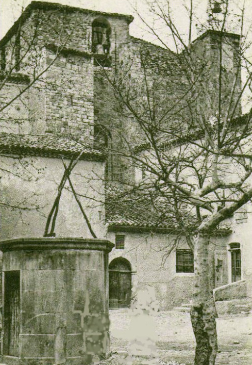 Cour du doyené et clocher de l'église à Valensole